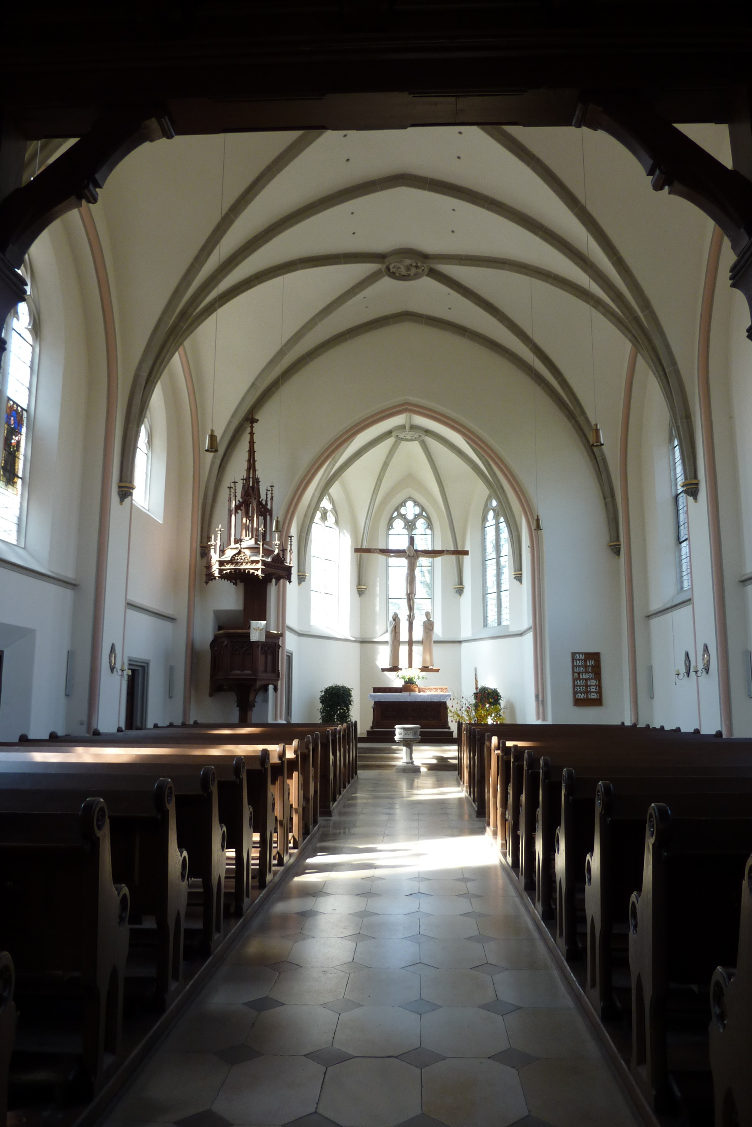 Evangelische Katharinenkirche in Dillingen an der Donau, Innenansicht